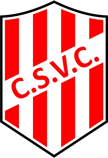 Escudo de Villa Cubas Catamarca